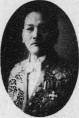 畑山四男美